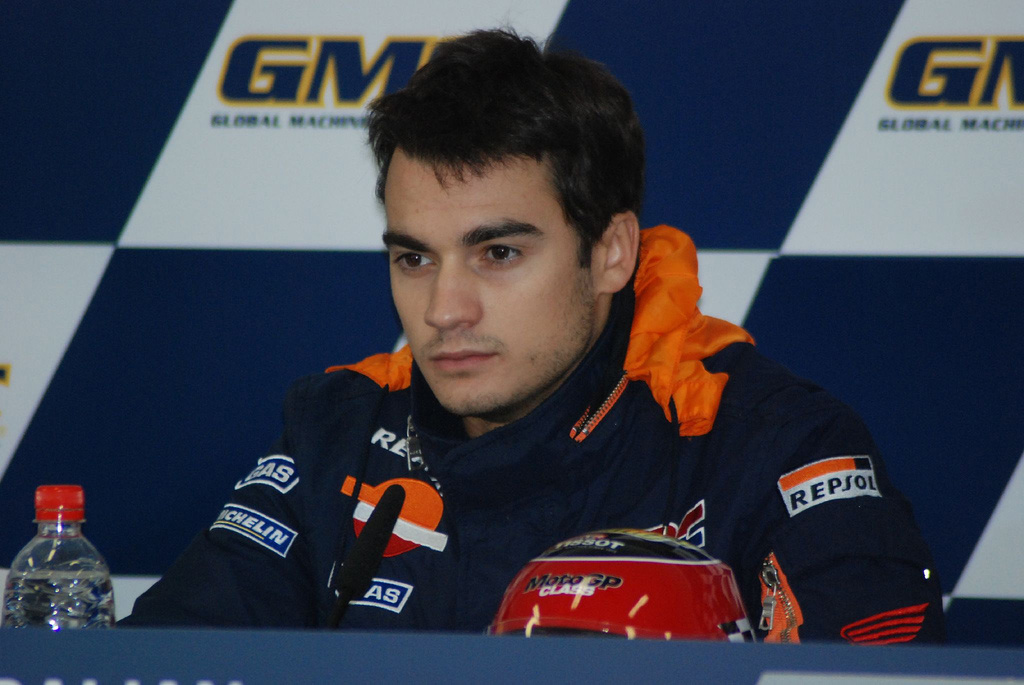 Dani Pedrosa, Post qualifying press conference.